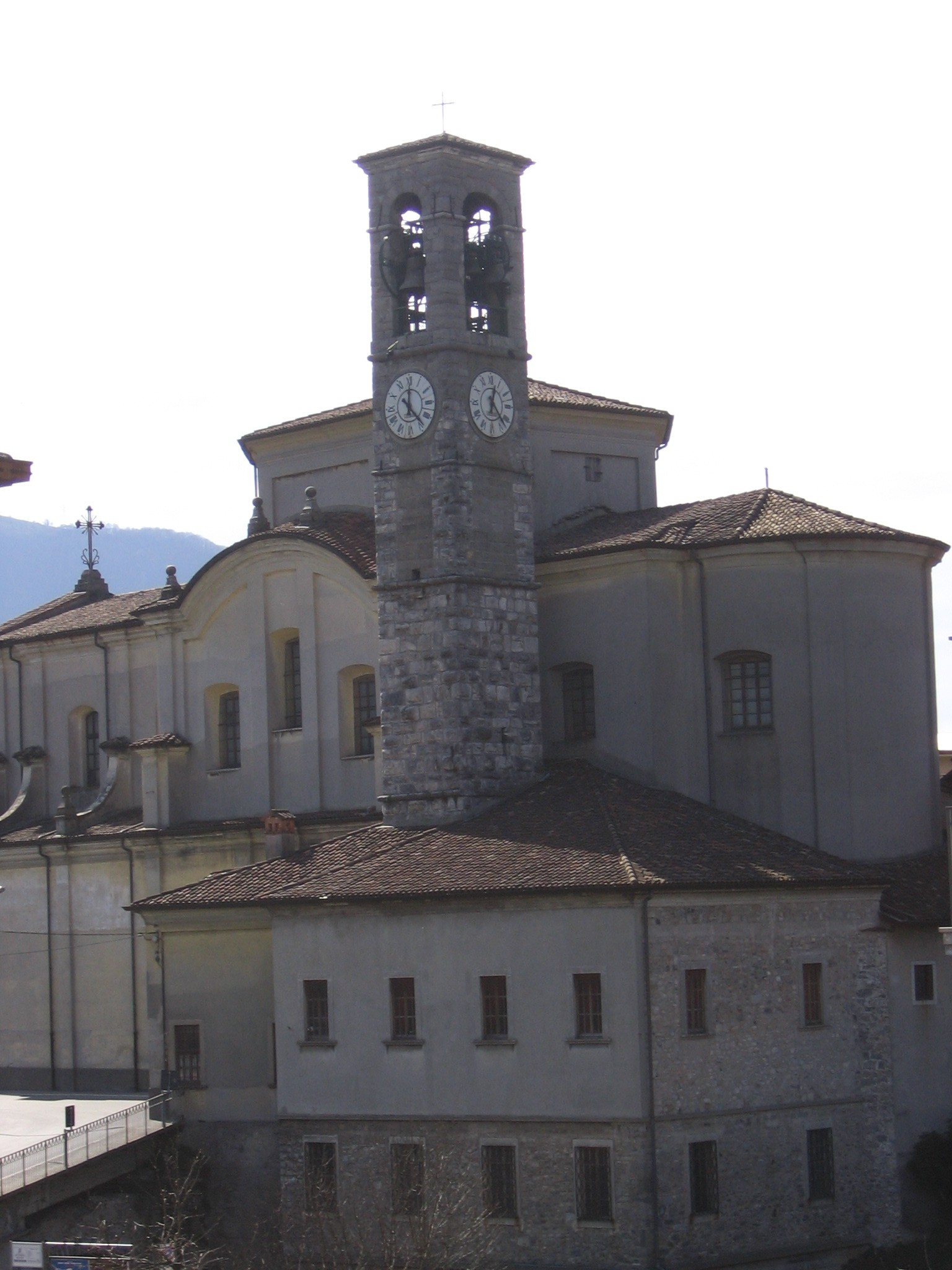 Cene, Bergamo, Italia